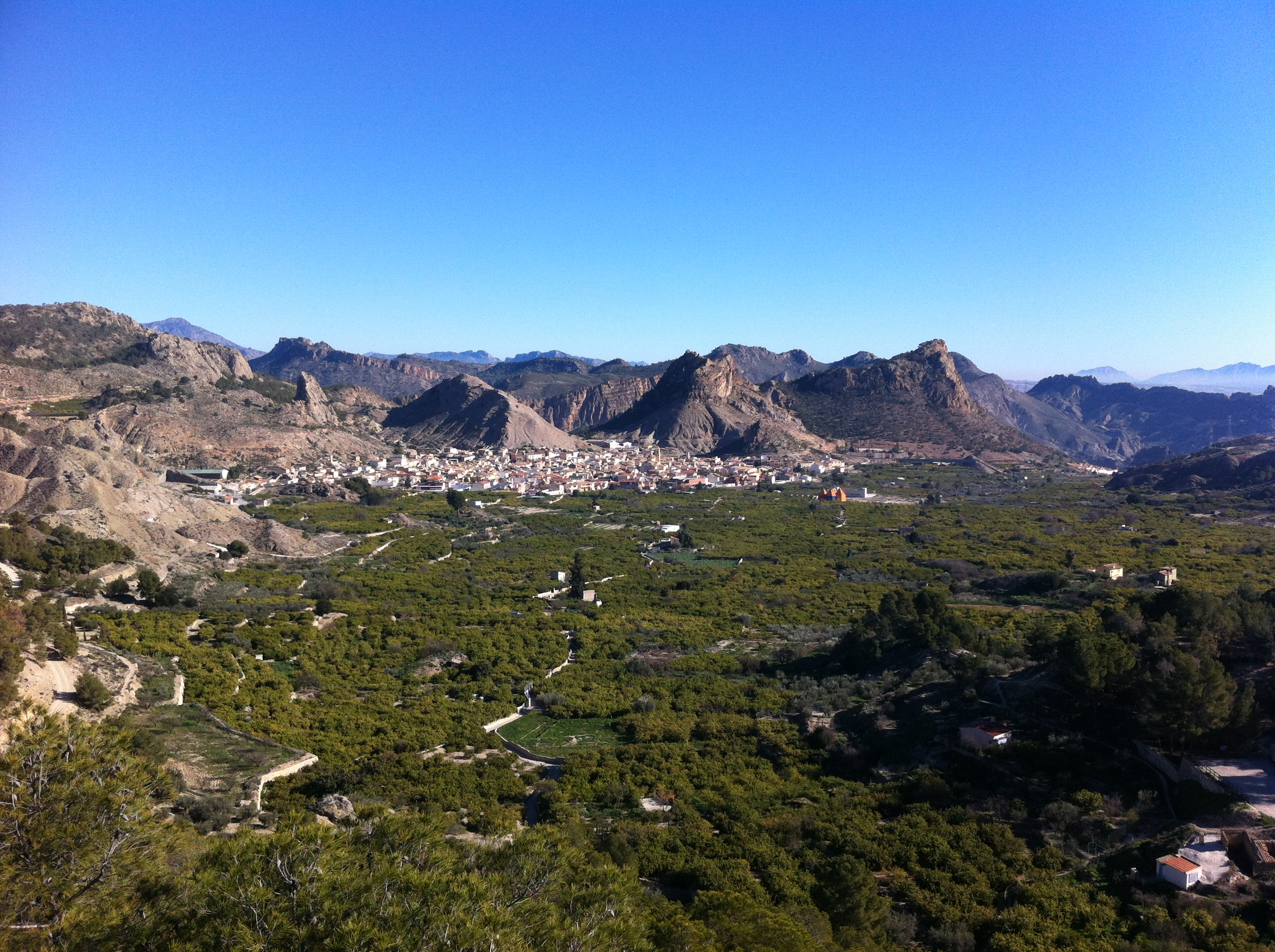 Imagen de Ricote (Murcia, España) y su huerta desde la Sierra de Ricote.